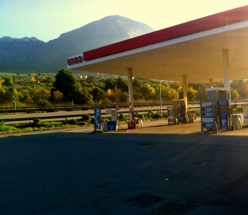 L'area di servizio "Scillato" sull'autostrada A19 Palermo-Catania.